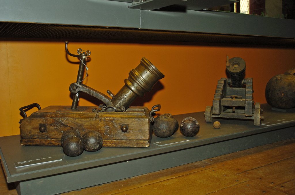 Mortier (Ontworpen Van Coehoorn, vestingbouwer 18de eeuw; hij heeft een handzaam schiettuig ontworpen